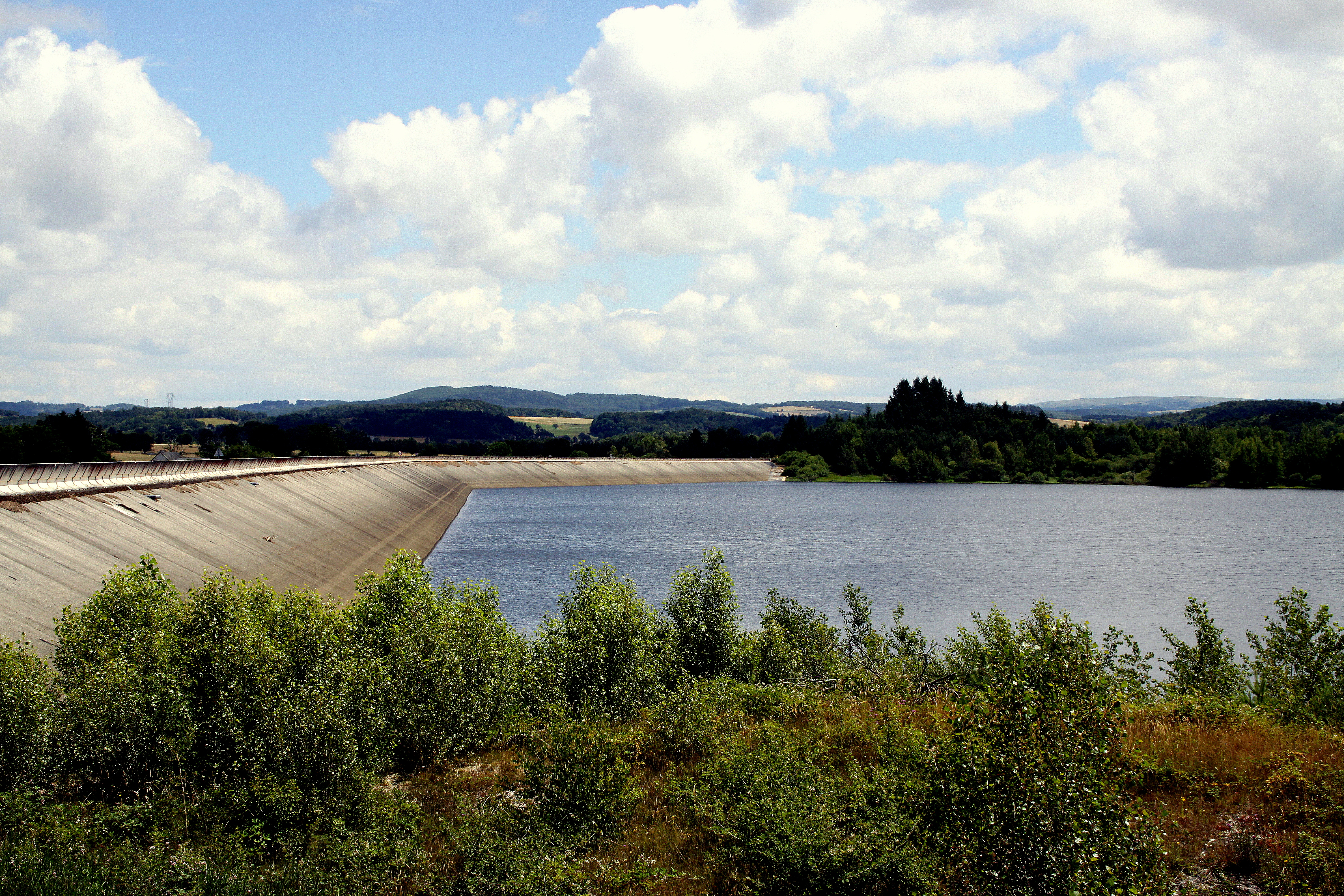 D'Staumauer vu Monnès vu lénks gesinn